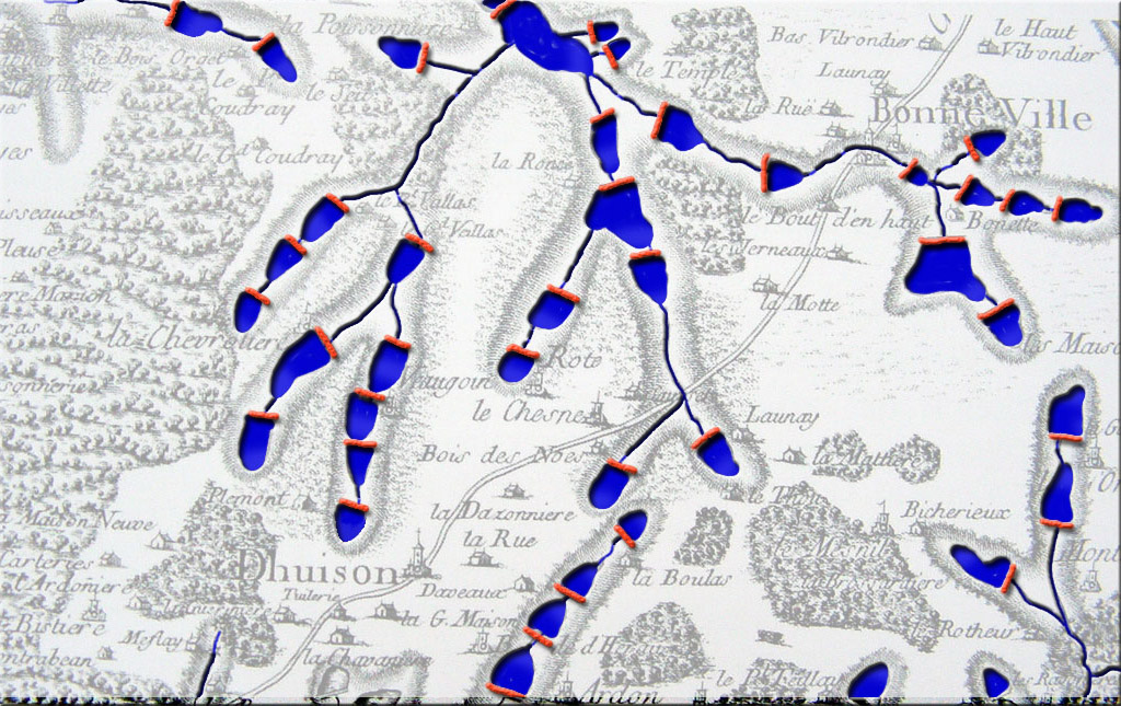 Du Moyen Âge jusqu'au XVIIe siècle, les moines et les paysans ont activement modifié le réseau hydrographique, notamment en établissant de nombreux petits barrages. Certains se sont substitués aux barrages issus d'embâcles naturels ou construits par les castors (même si ceux-ci sont en Europe des constructeurs plus modestes que leurs cousins nord américains). À noter qu'en conservant des volumes d'eau et une hauteur d'eau plus importante en saison sèche, ces barrages ont également pu "tamponner" les fluctuations estivales des nappes (car toutes choses égales par ailleurs, c'est la hauteur d'eau qui contrôle la vitesse de percolation, cf. Loi de Darcy).